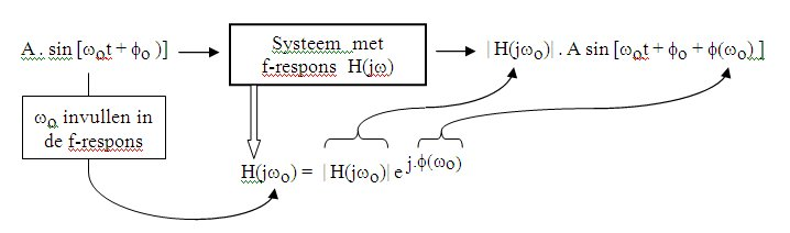 Amplitude respons van een opladen van een condensator over een weerstand door middel van een gelijkspanning